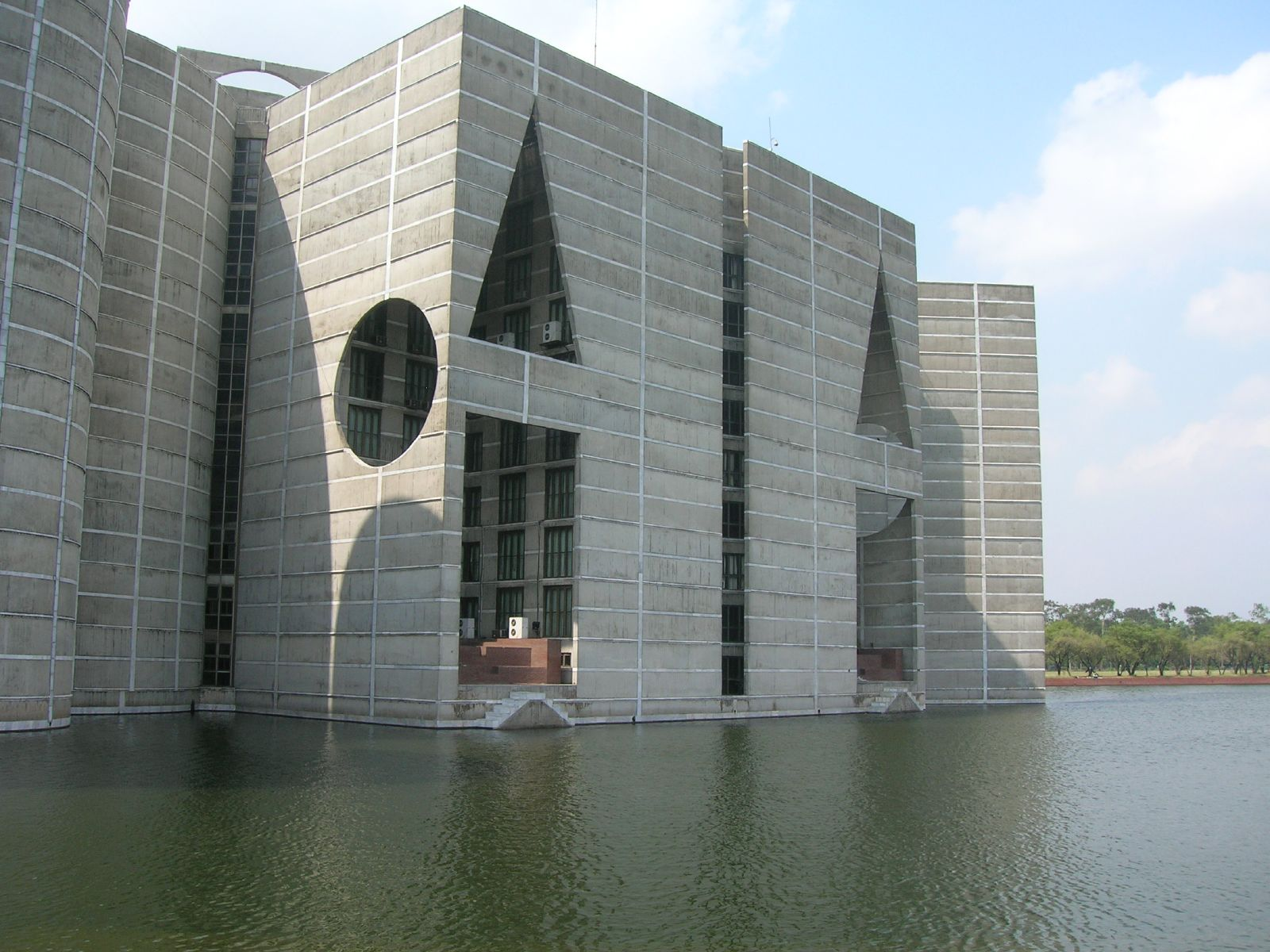 Jatiyo Sangshad Bhaban, national parliament of Bangladesh